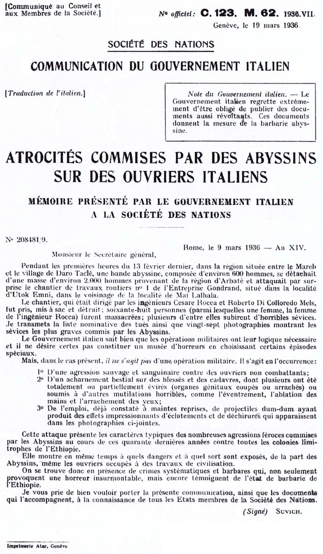 Denuncia presentata dal governo italiano in merito al massacro del cantiere dell'azenda Gondrand in località Mai Lahlà